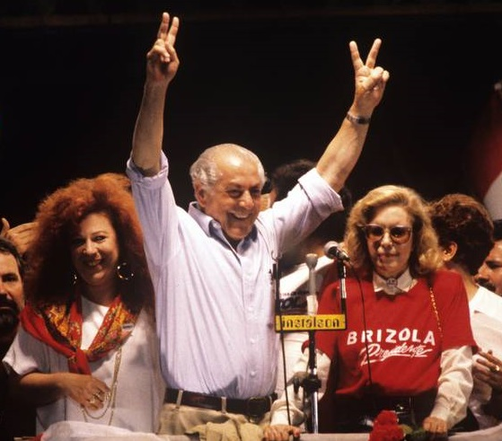 Leonel Brizola durante sua campanha presidencial de 1989.